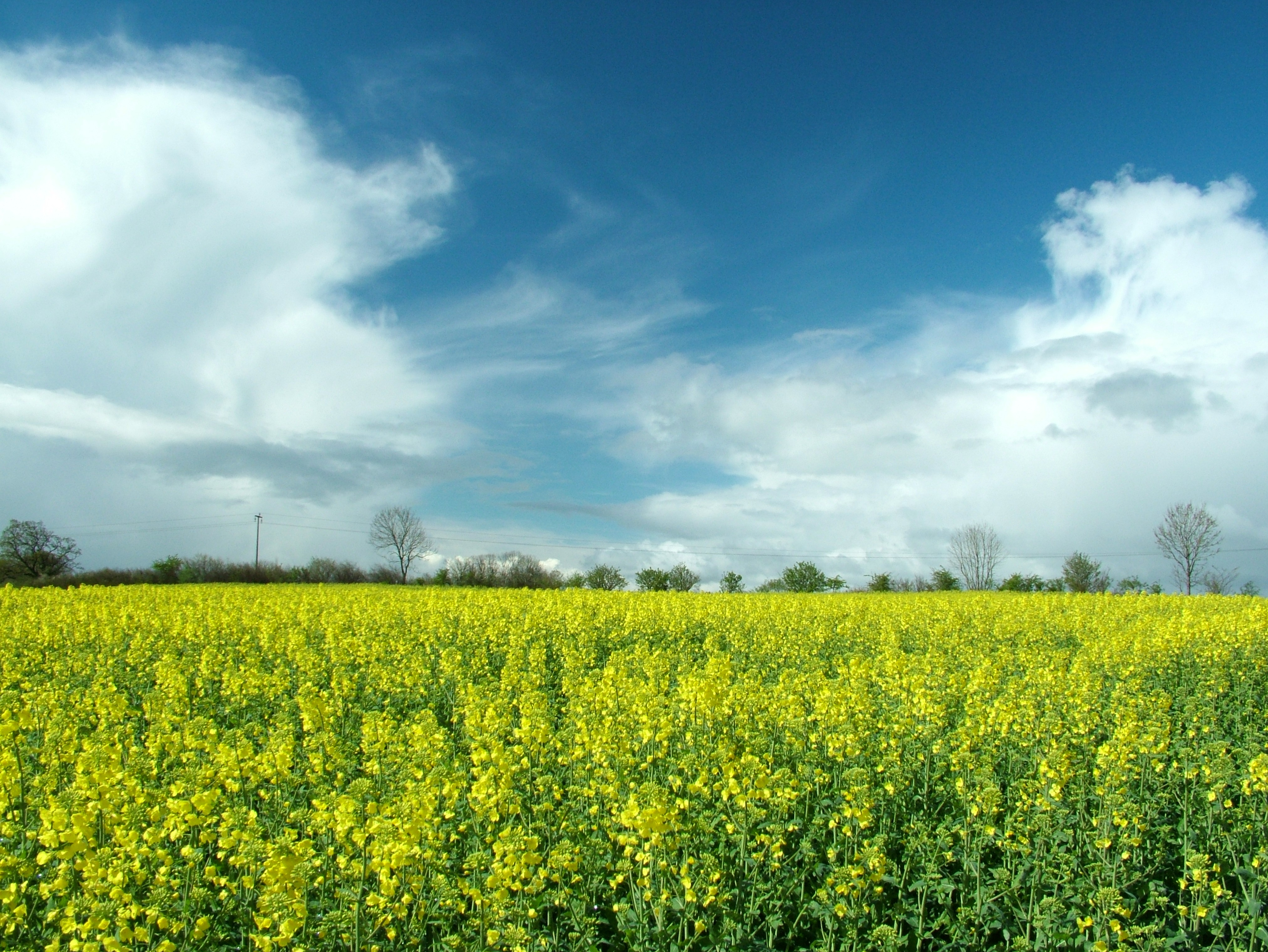 Ein Rapsfeld ((Brassica napus) bei Kappeln Schleswig-Holstein